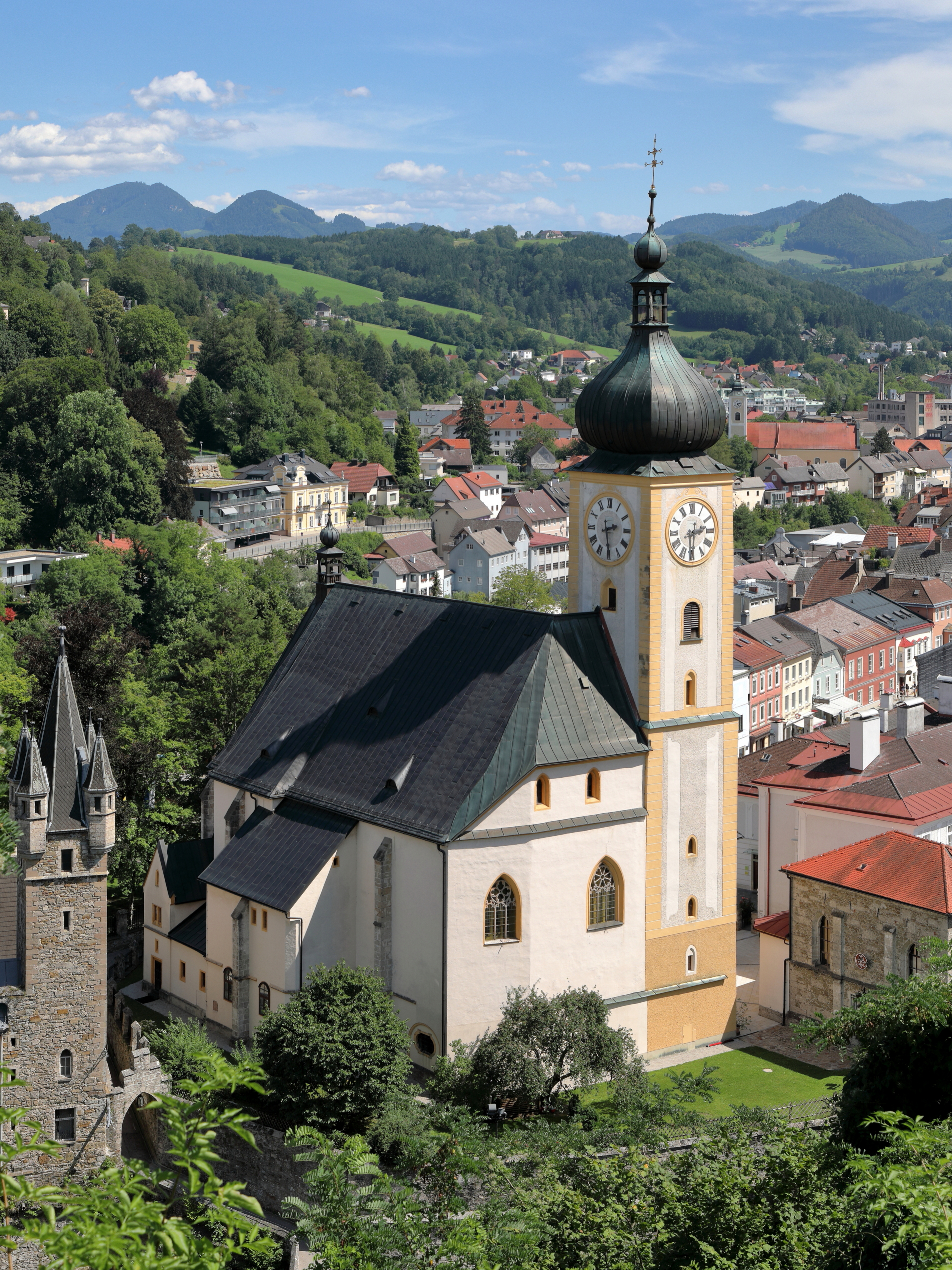 Westansicht der röm.-kath. Stadtpfarrkirche hll. Maria Magdalena und Lambert in der niederösterreichischen Stadtgemeinde Waidhofen an der Ybbs.Die spätgotische Hallenkirche wurde von 1470 bis 1510 unter Miteinbeziehung von Teilen der Stadtbefestigung (Westwand, Kirchturm) errichtet. 1689 wurde der Kirchturm erhöht und barockisiert.